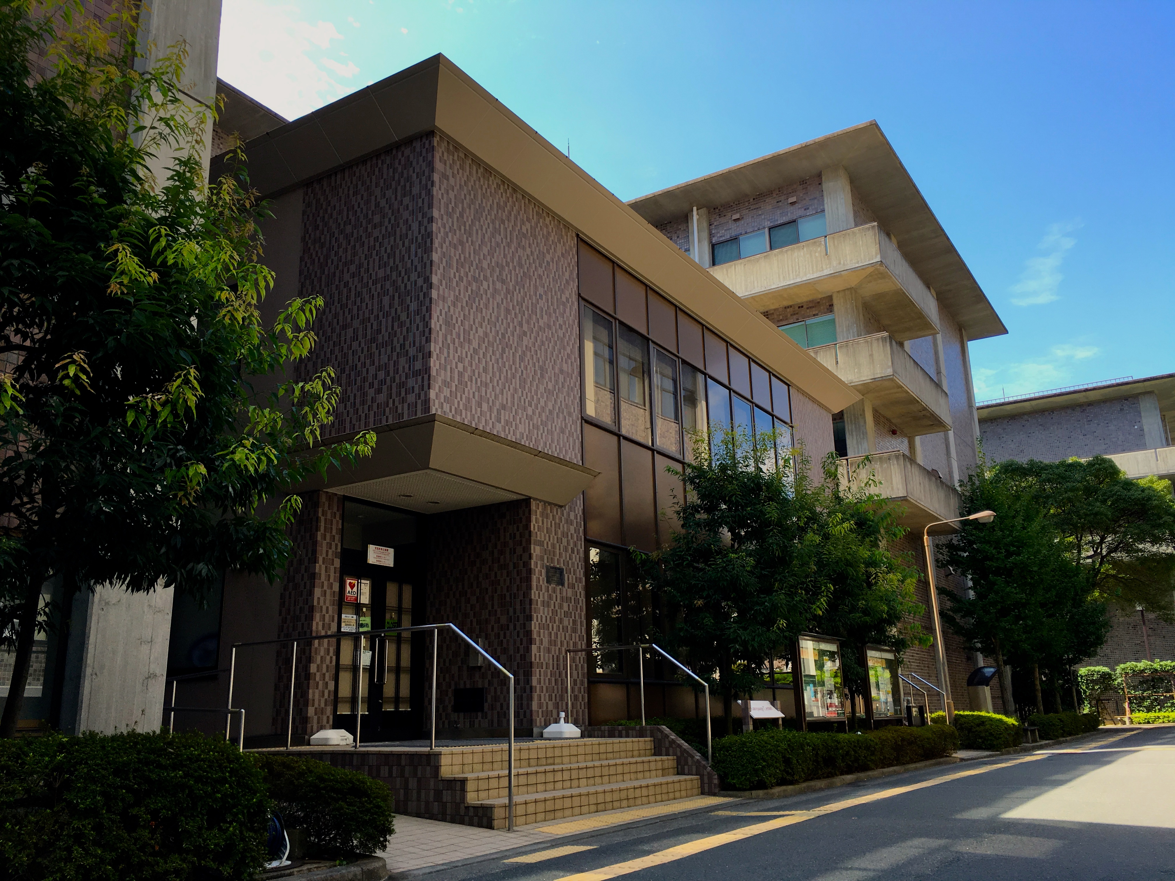 The photo was taken by me on September 10, 2016.